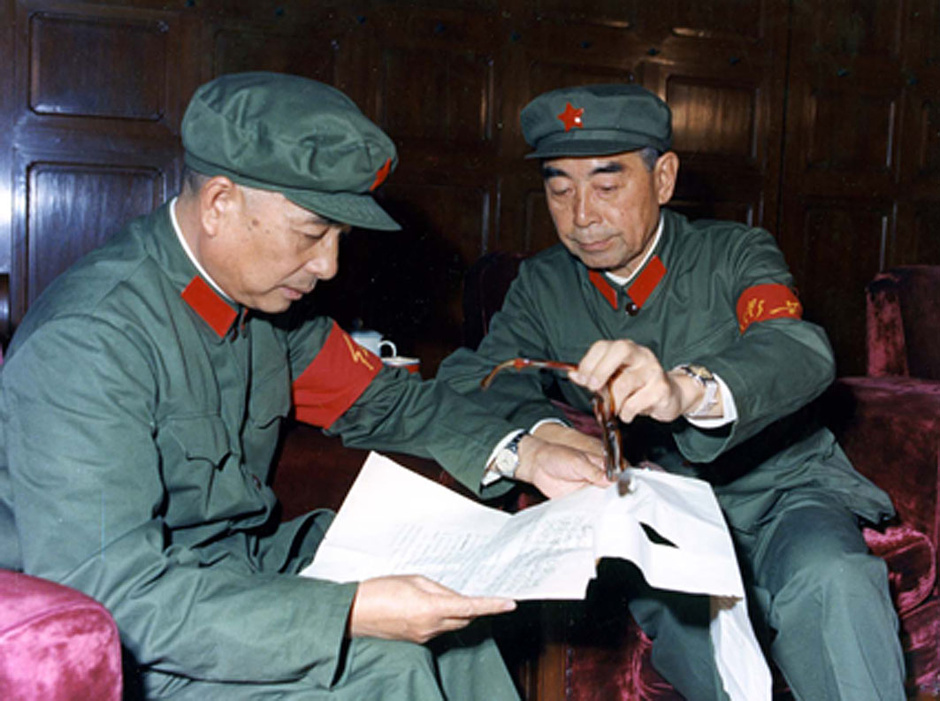 1966年9月15日，周恩来与陶铸在天安门城楼休息室。